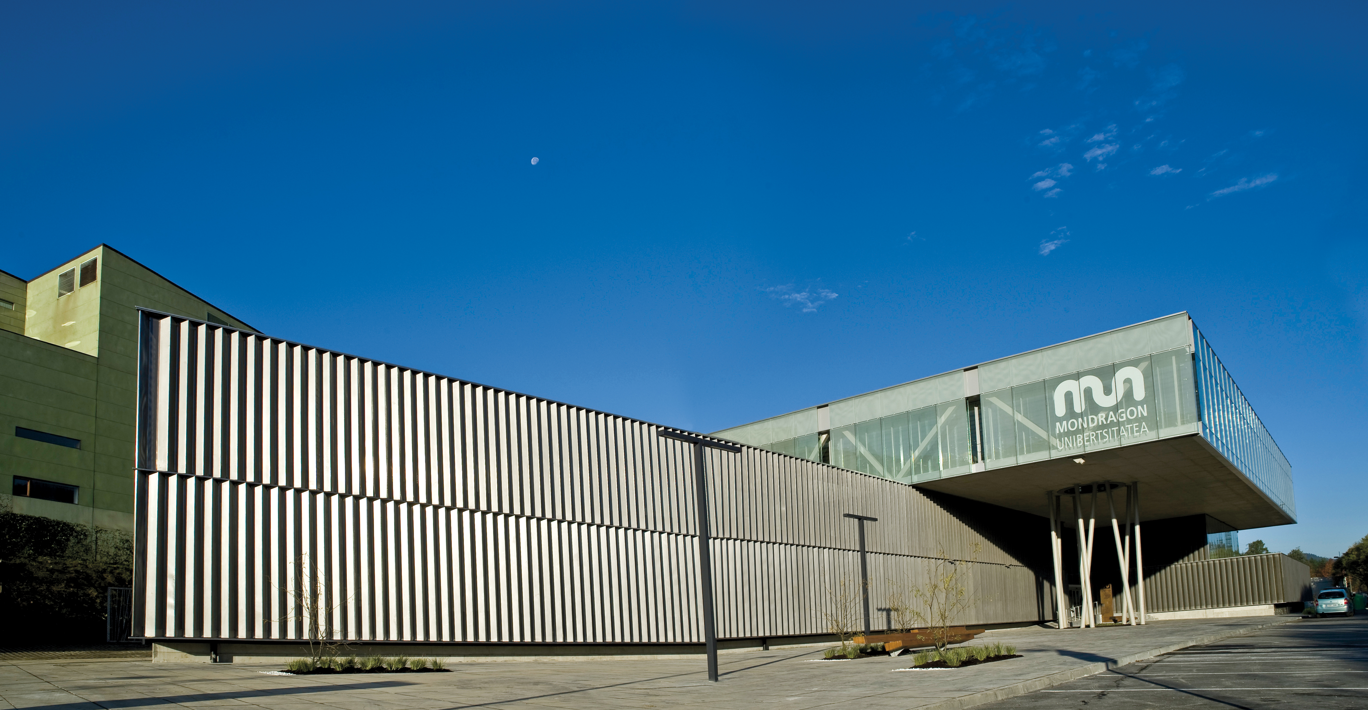 Edificio de la Facultad de Empresariales